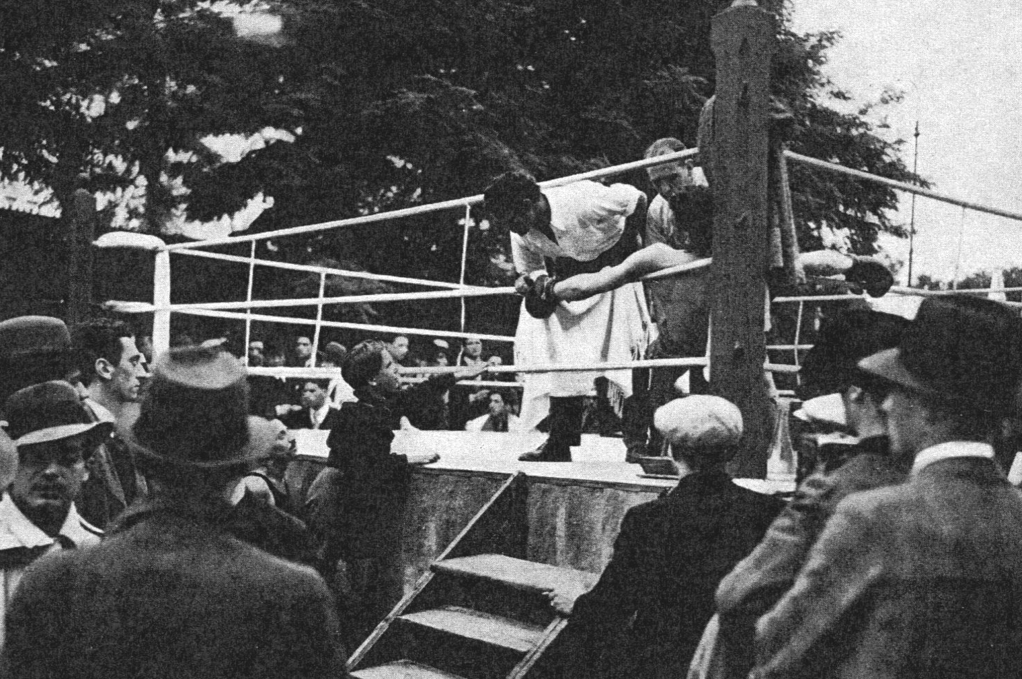 Ragazzo, regia di Ivo Perilli 1934 - prod "Cines" Roma - foto di scena